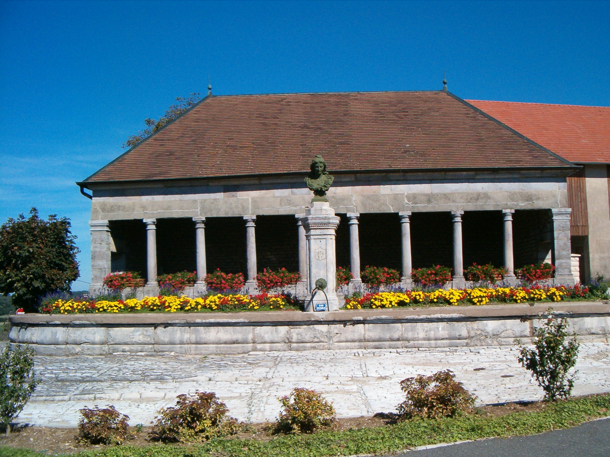 Fontaine Marianne, à Bolandoz dans le Doubs